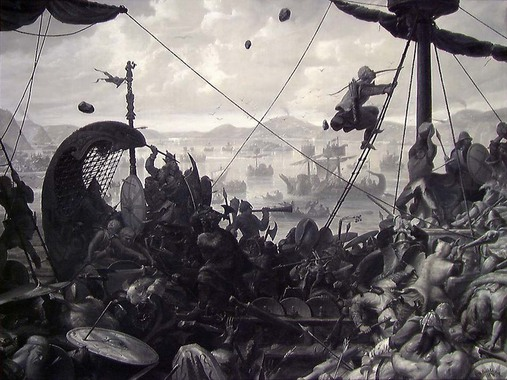 Norwegian: Harald Hårfagre i slaget ved Hafrsfjordtitle QS:P1476,no:"Harald Hårfagre i slaget ved Hafrsfjord" label QS:Lno,"Harald Hårfagre i slaget ved Hafrsfjord"